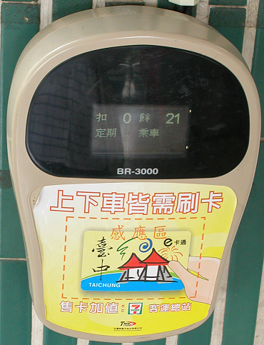 臺中e卡通驗票機。